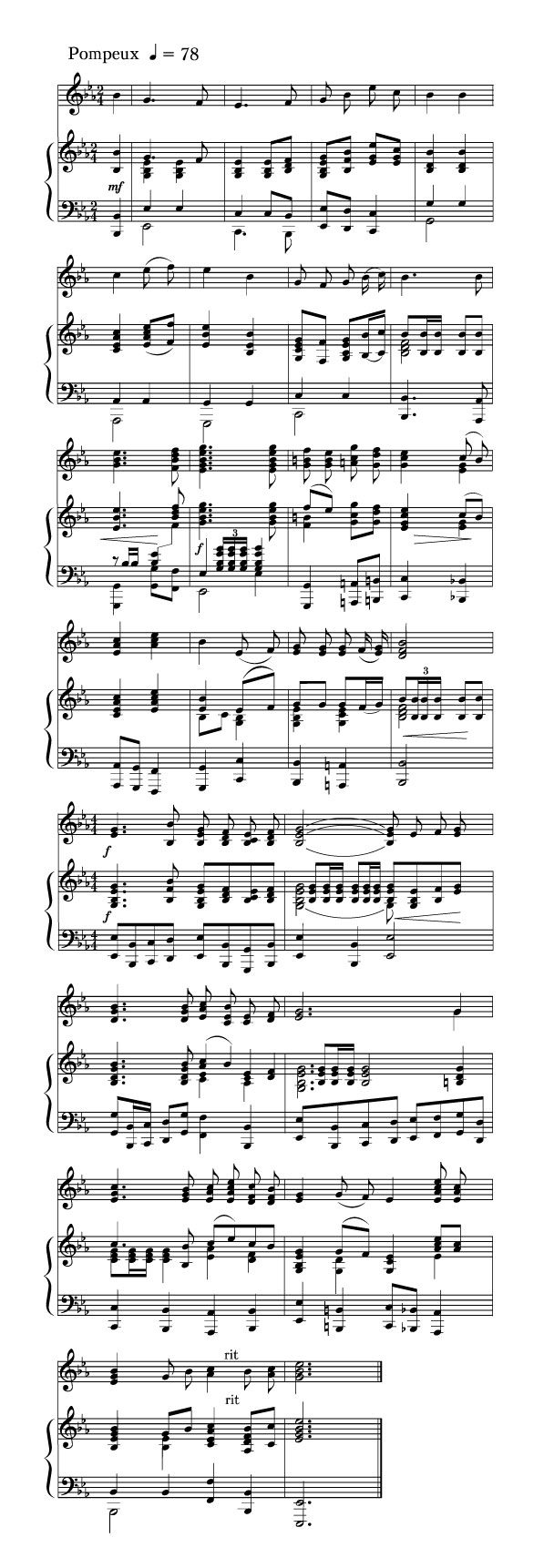 Ноты официального Гимна Республики Башкортостан.